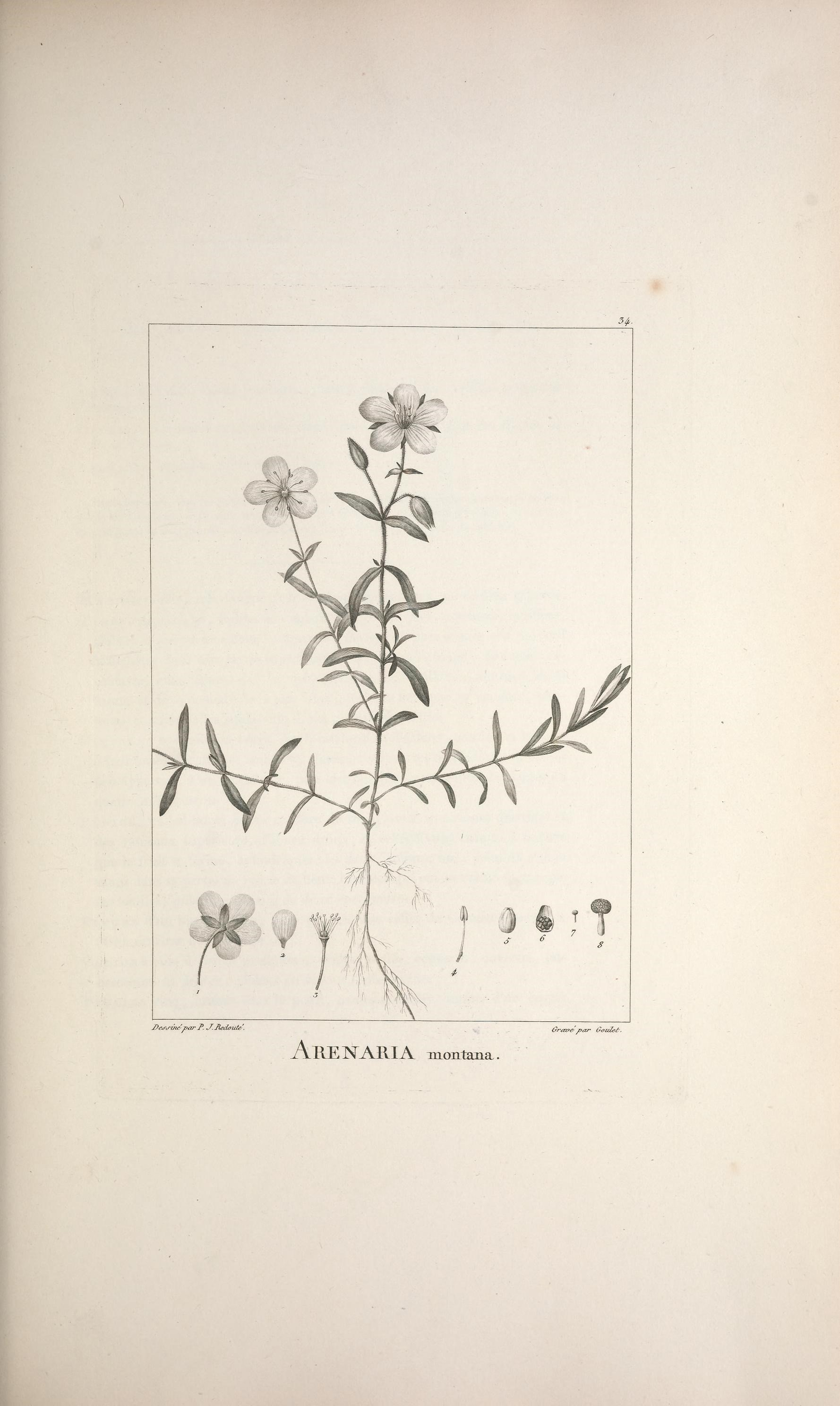 Grave par ûouZet. AllENARIA montana.